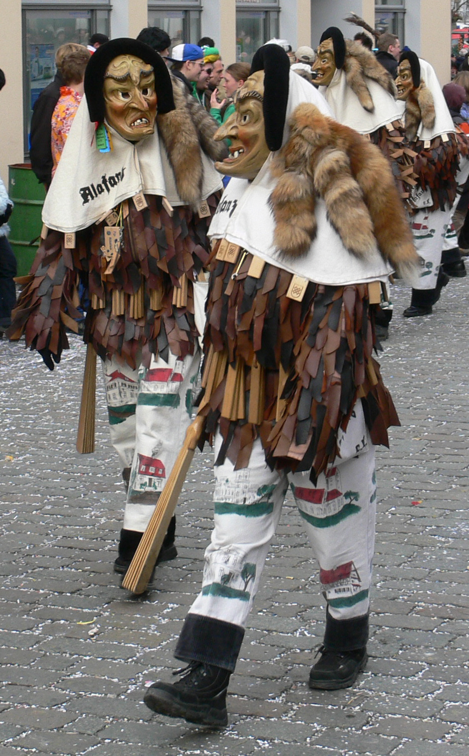 Narrensprung am Fasnetsmontag, 4. Februar 2008 in Ravensburg: Alafanz der Narrenzunft Berger Alafanz, 88276 Berg